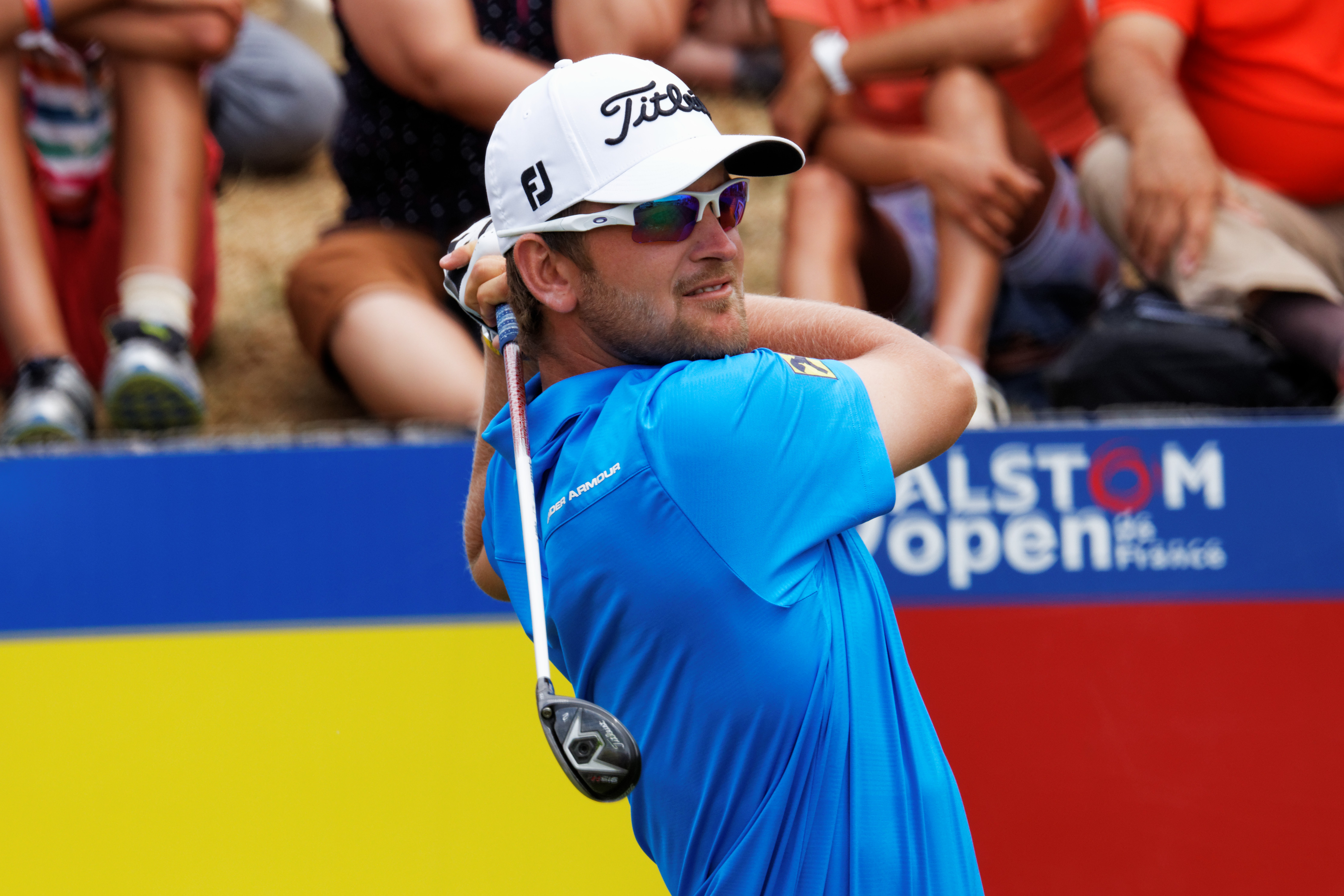 Image prise lors de l'Alstom - Open de France 2015 - Départ du tee n°1 - 4éme tour